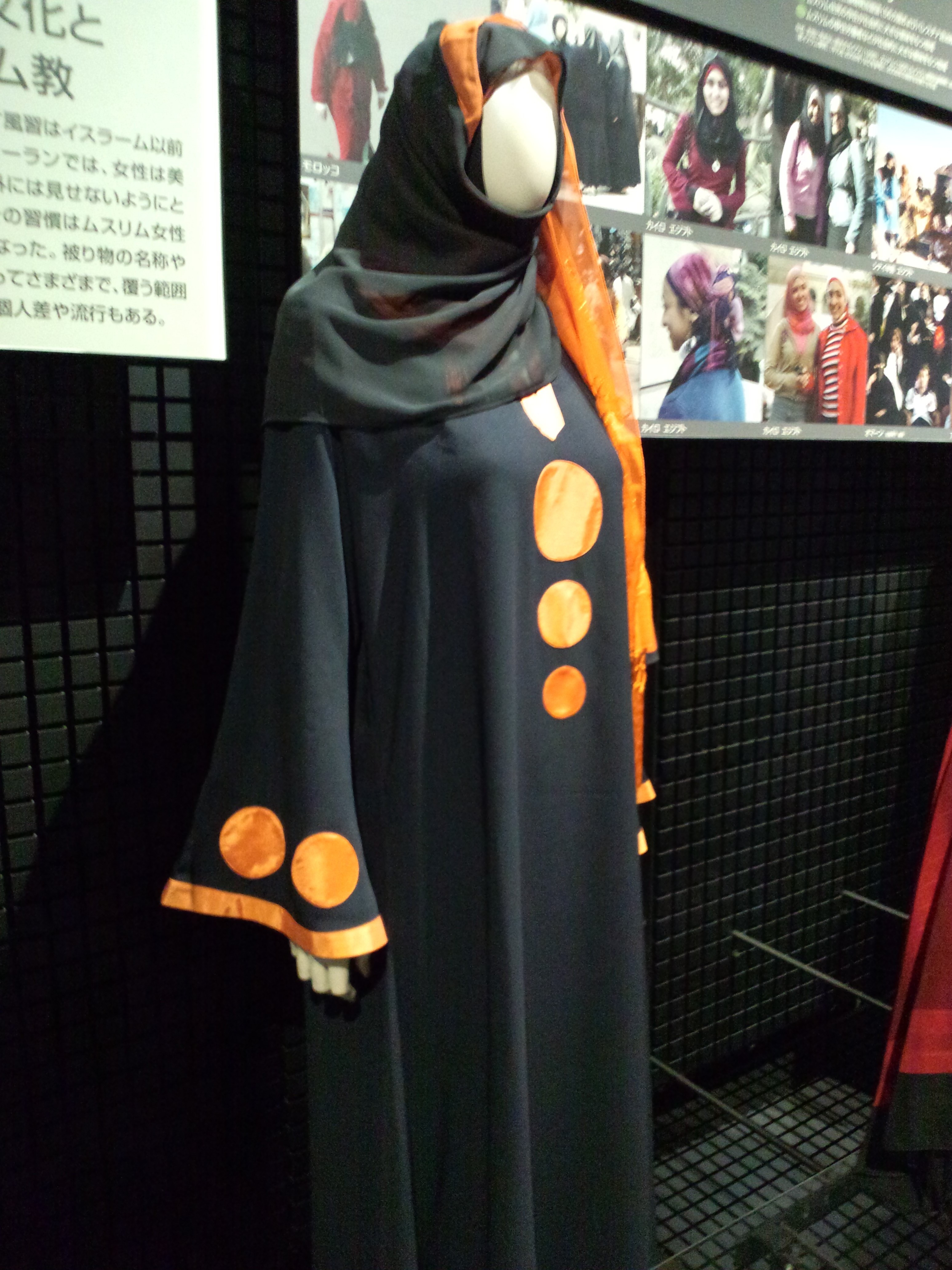 国立民族学博物館（大阪） エジプトのムスリム女性服（エジプト、カイロ、2002年収集）